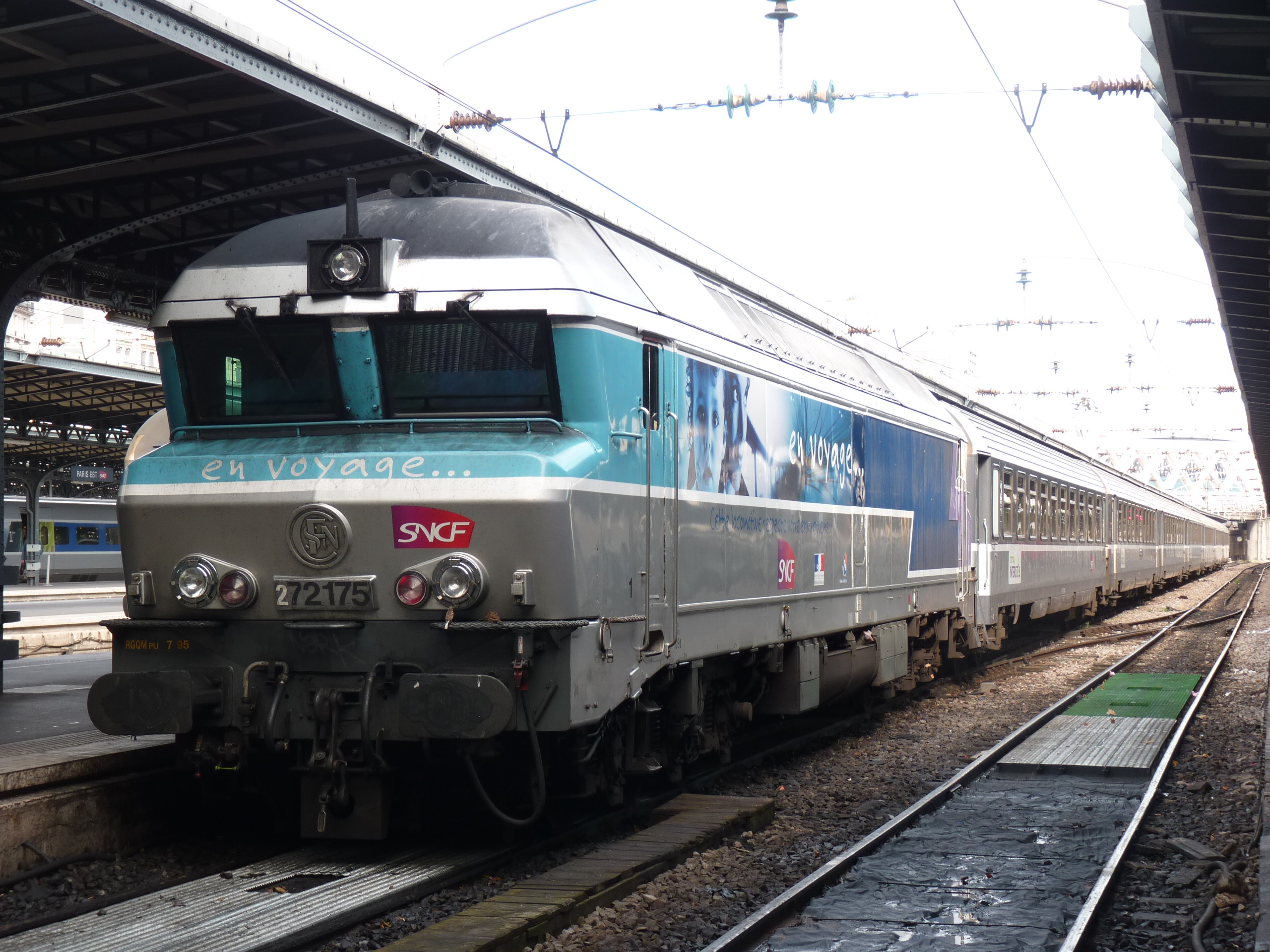 La locomotive Diesel CC 72175 à la gare de Paris-Est en livrée "en voyage ...".